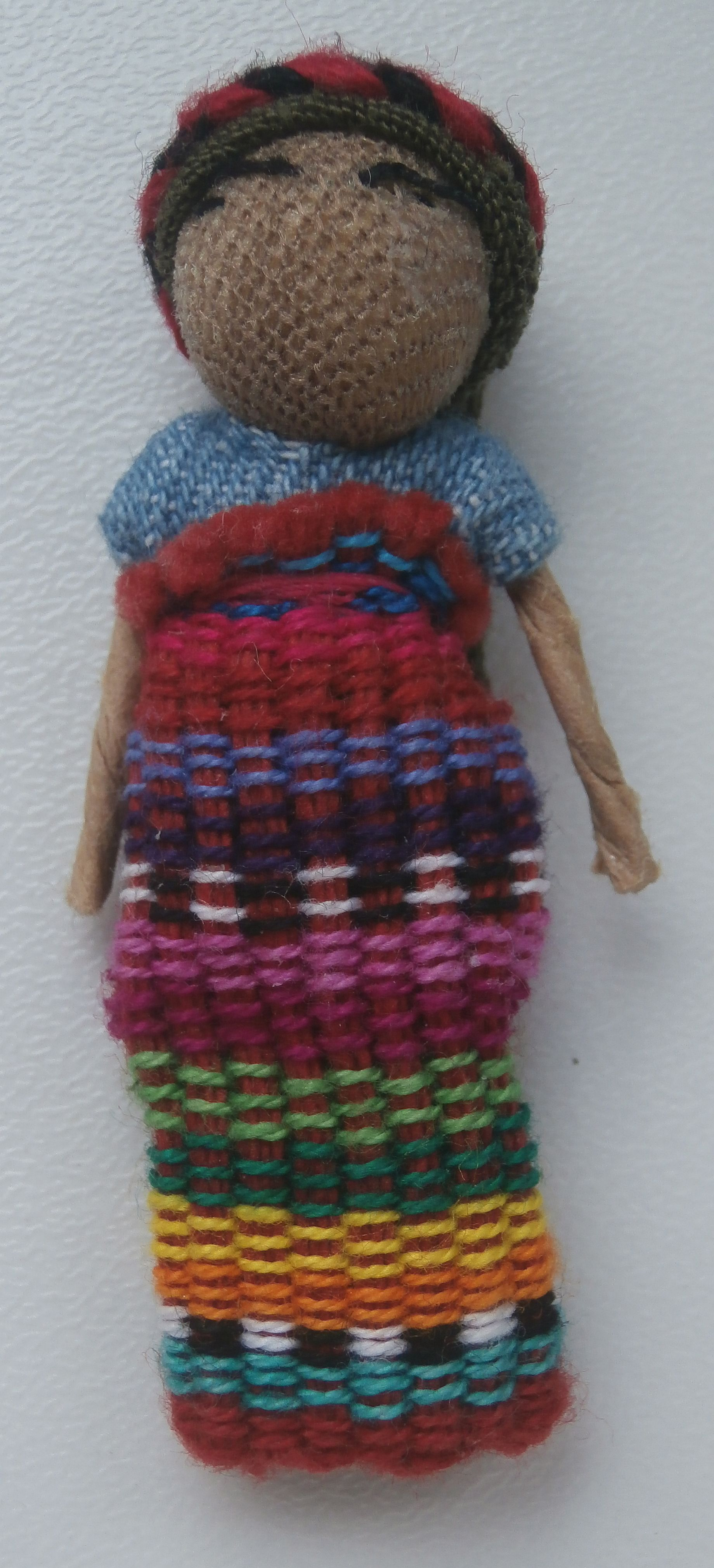 guatemalská panenka strachu